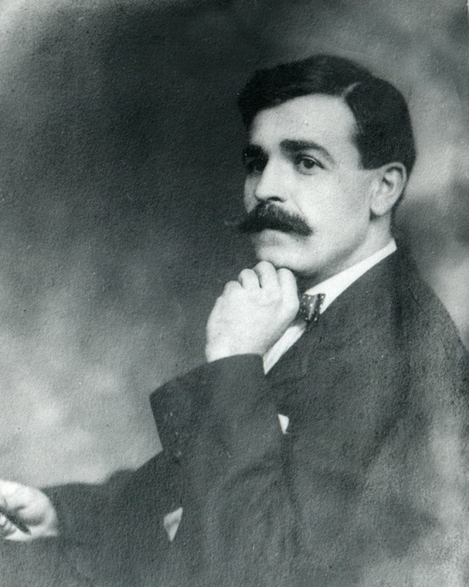 Христо Димкаров